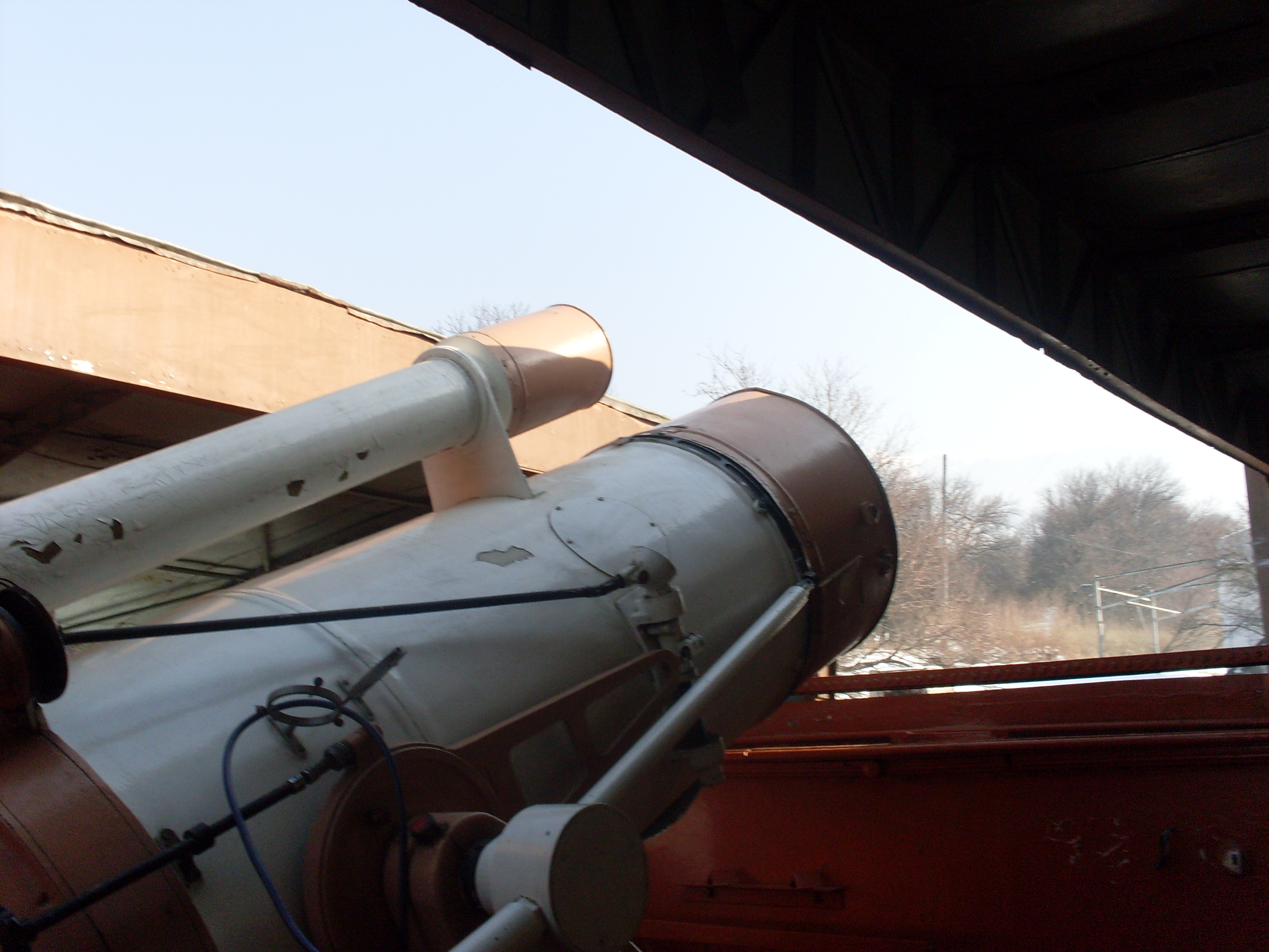 Первый в истории менисковый телескоп Максутова АСИ-2, установлен в обсерватории Астрофизического института им.Фесенкова (Алматы, Казахстан) в 1950